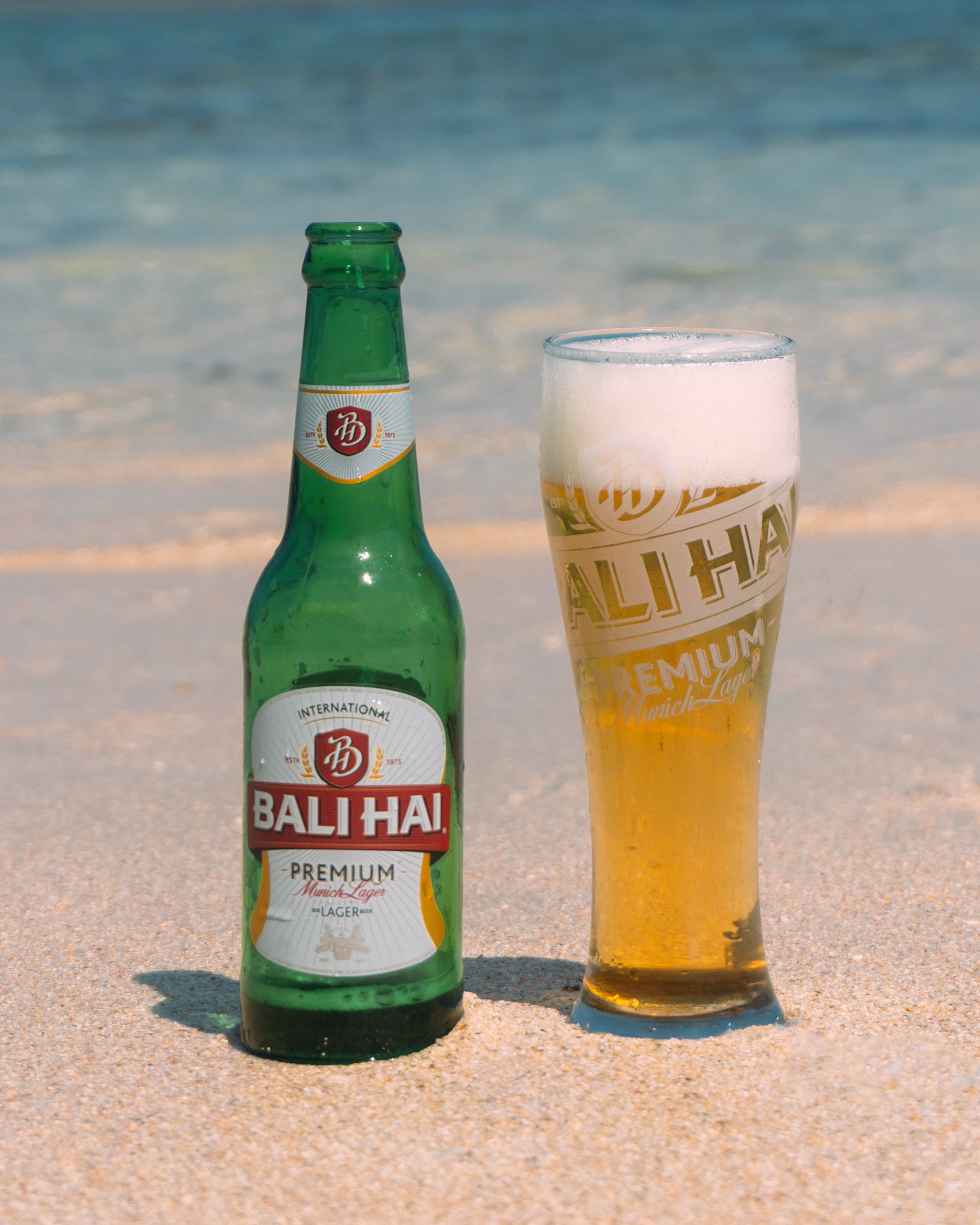 Bir Bali Hai Premium di pantai